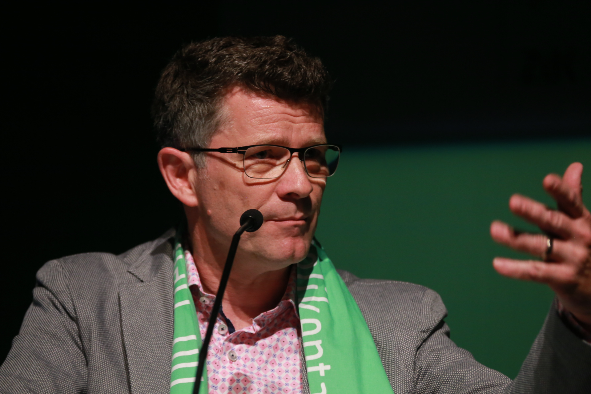 Peter Dabrock auf dem 100. Deutschen Katholikentag